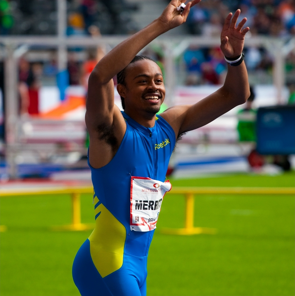 ISTAF Berlin 2012, 110m Hürden: Aries Merritt